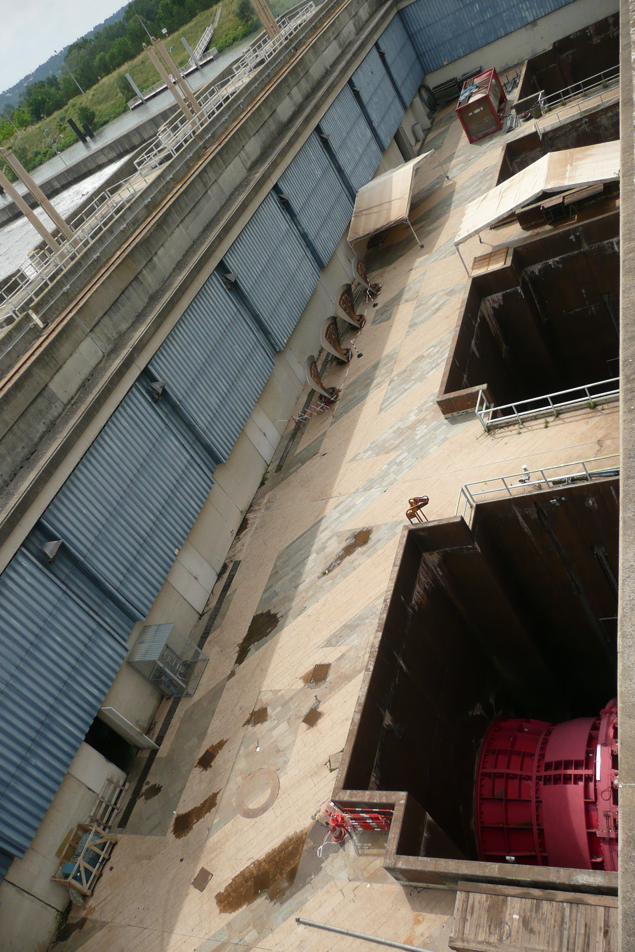 Compagnie nationale du Rhône, 1973, usine écluse d'Avignon.